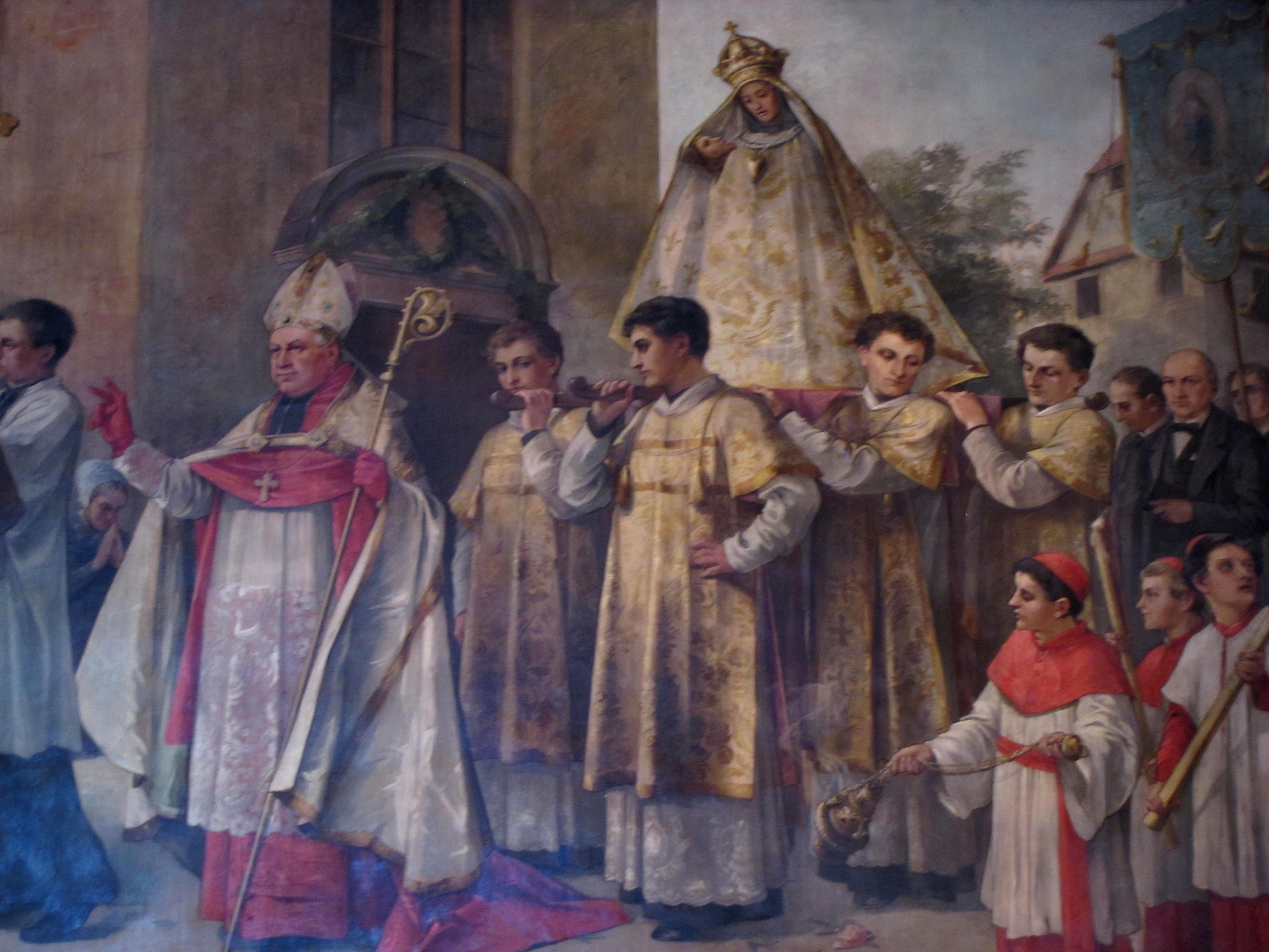 Alsace, Bas-Rhin, Haguenau, Basilique Notre-Dame-des-Douleurs de Marienthal (ancien Prieuré des Guillemites) (IA00062022). Fresque "Cérémonie de Couronnement de la Vierge de Pitié en 1859" (Martin von FEUERSTEIN, 280x830, 1889)